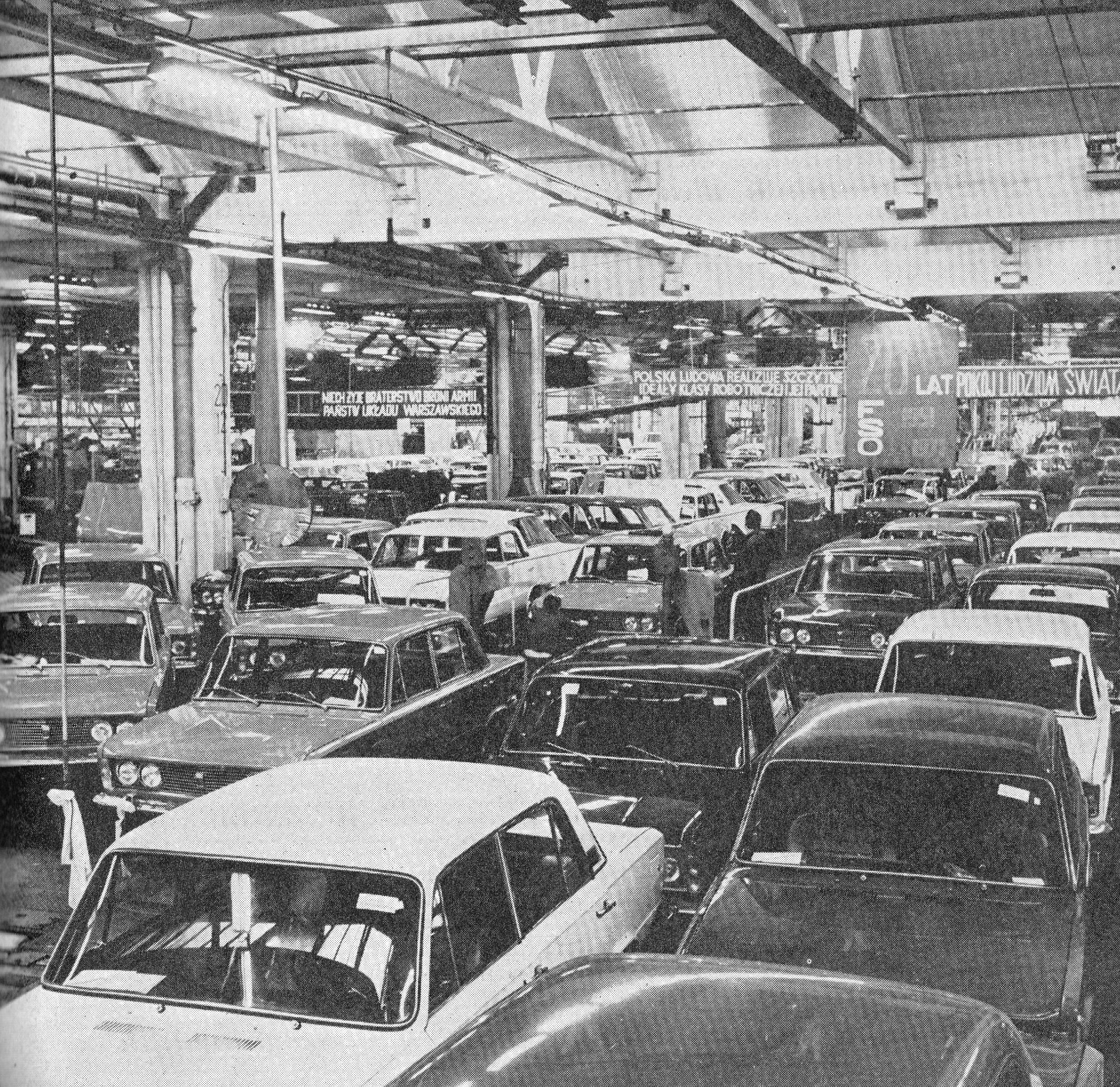 Fiaty 125p opuszczają FSO w Warszawie